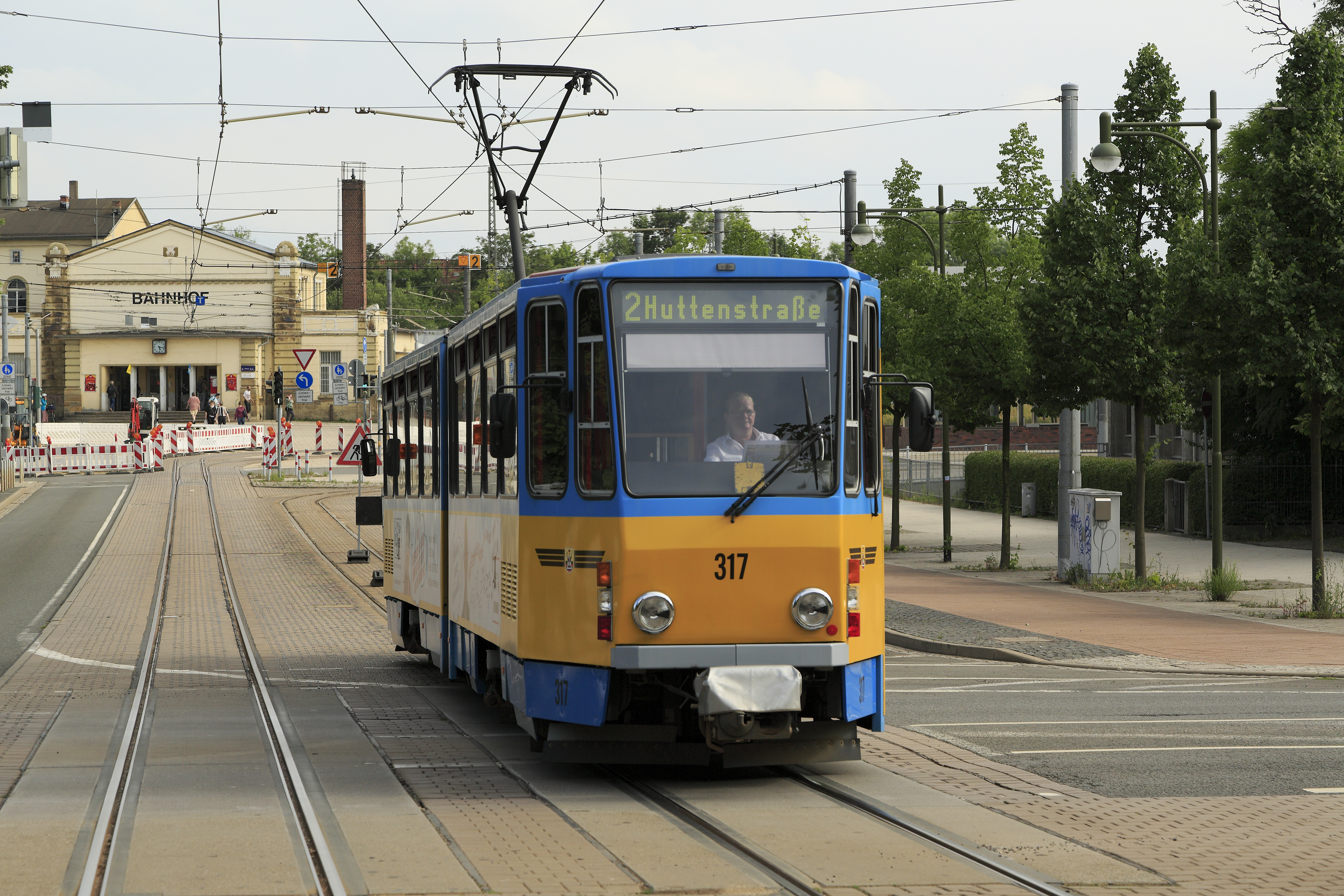 Zug der Pendellinie 2 (Haupt)bahnhof–Huttenstraße bei der Fahrt Richtung Huttenstraße. Man könnte das Fahrzeug aus dieser Perspektive für die britische Ausführung als »KT4UK« halten. Der vollwertige Führerstand am B-Ende wurde jedoch nachträglich eingebaut. Außerhalb von Bauarbeiten verkehren die zwei in dieser Form vorhandenen Wagen auf der Linie 6 zwischen Gleisdreieck und Walthershausen.